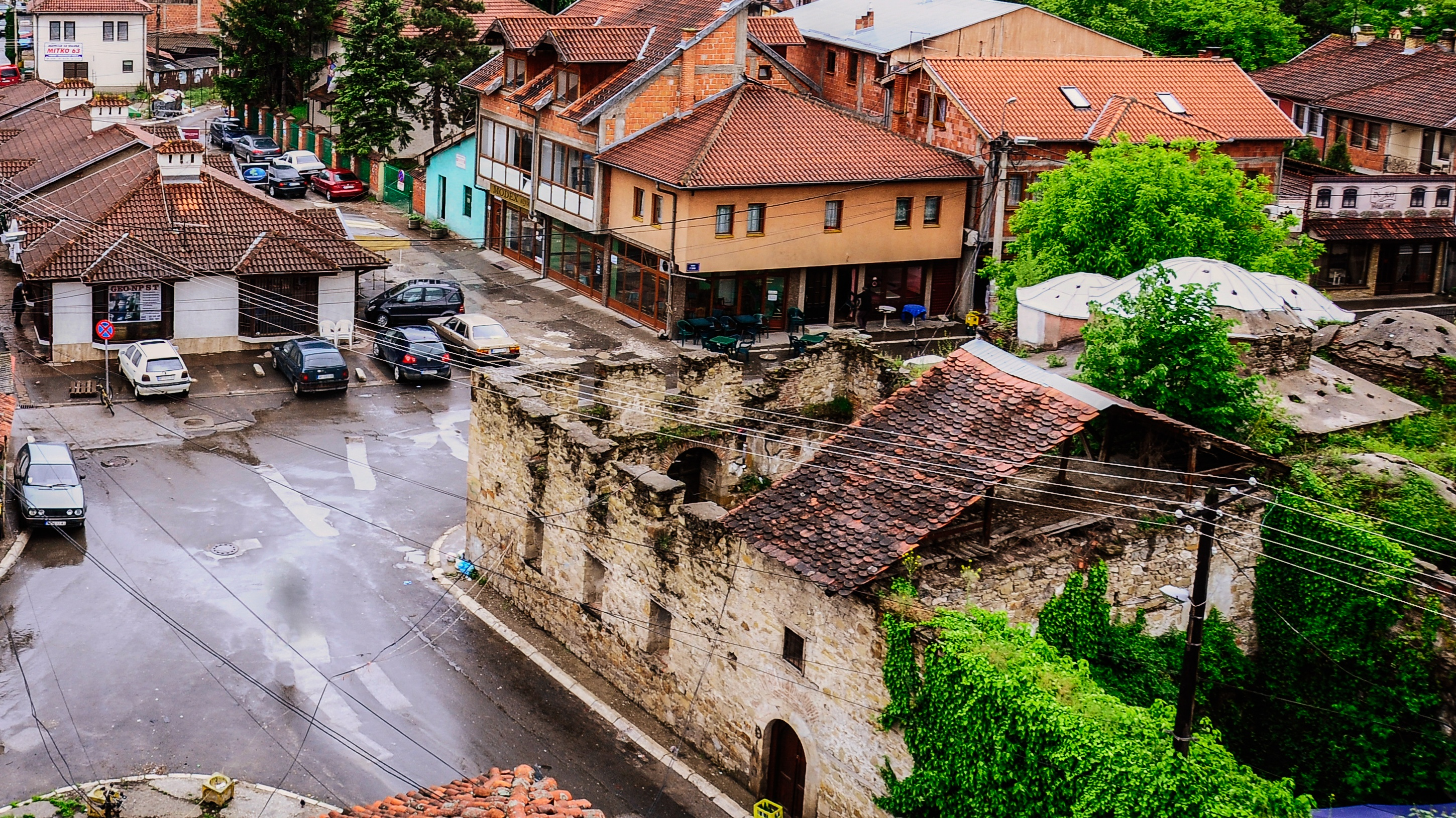 Stari hamam